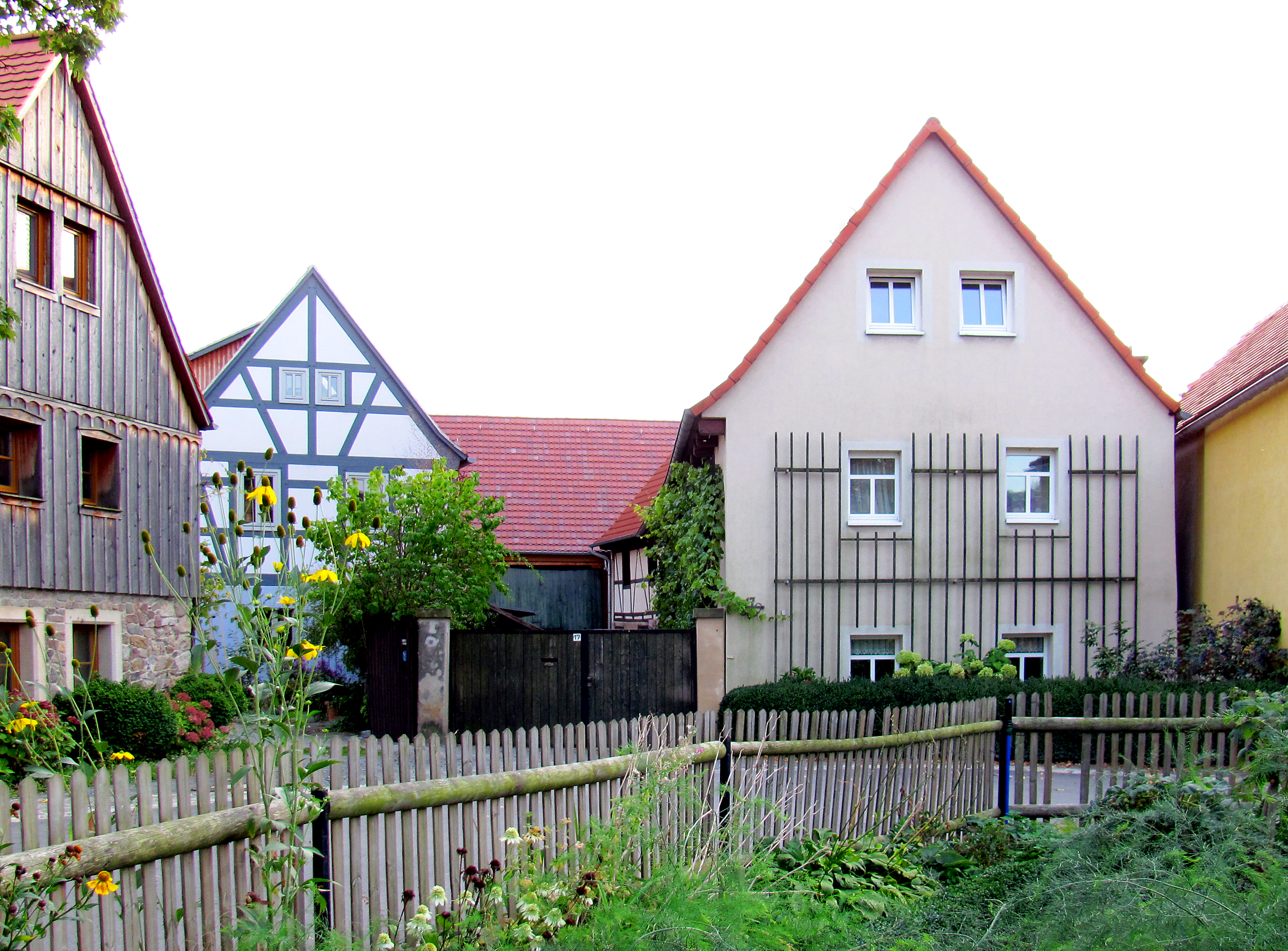 Radebeul, Zweiseithof Altzitzschewig 17